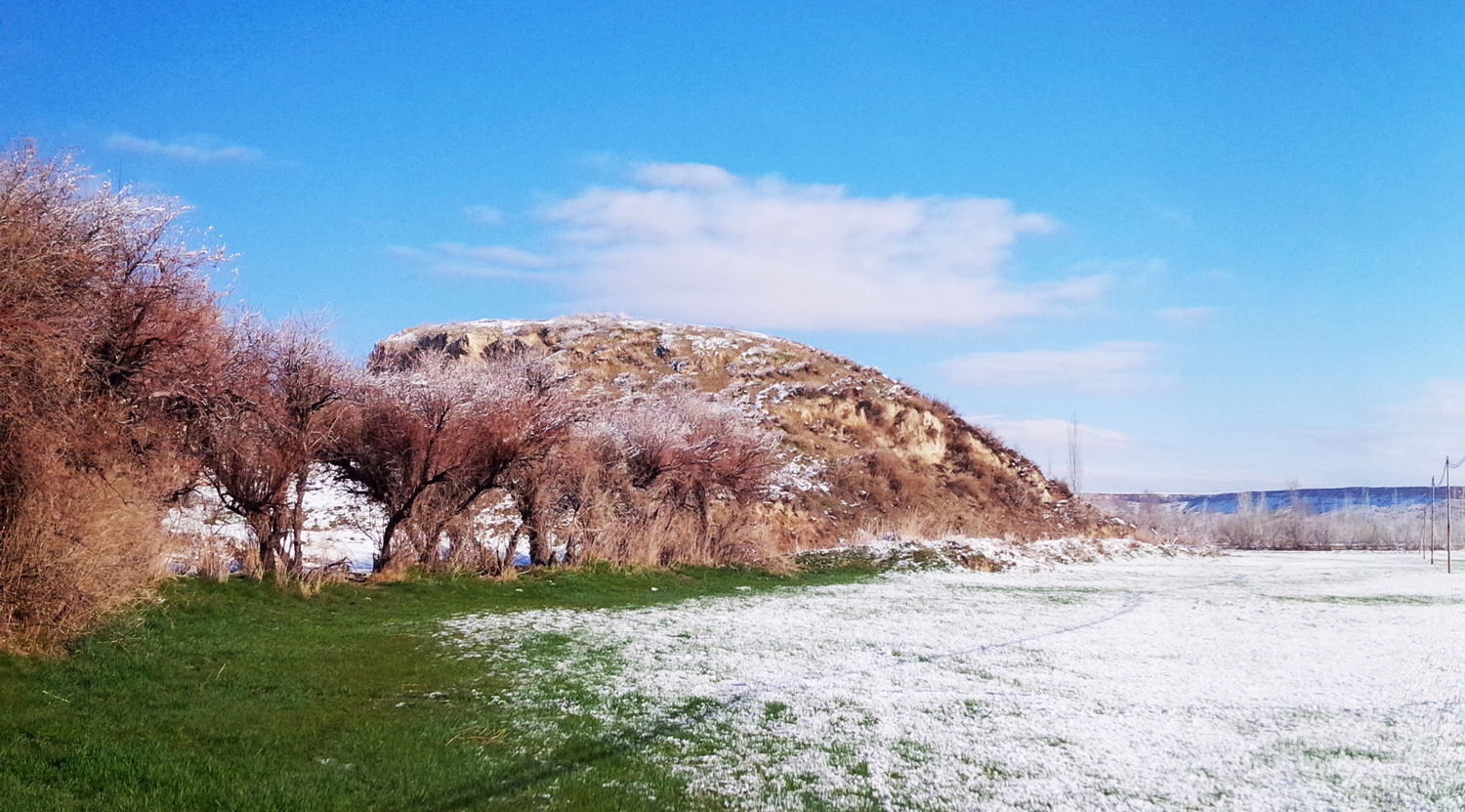 تپه مسجدین